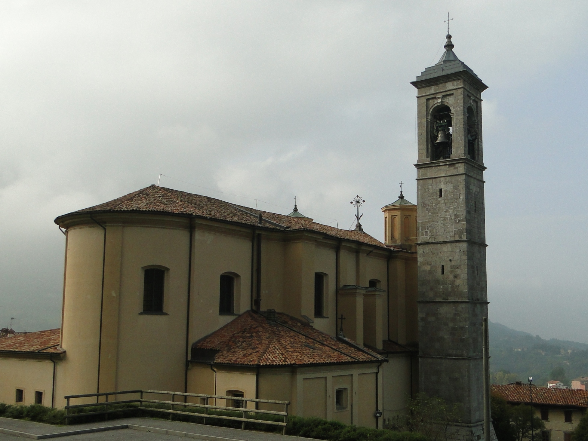 Vall'Alta di Albino (BG), Chiesa parrocchiale di Santa Maria Assunta e San Giacomo Maggiore